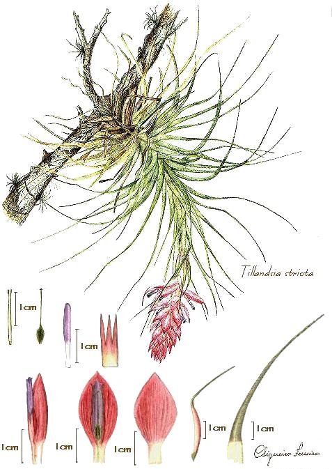 Bromélia por Cristina Siqueira Ferreira